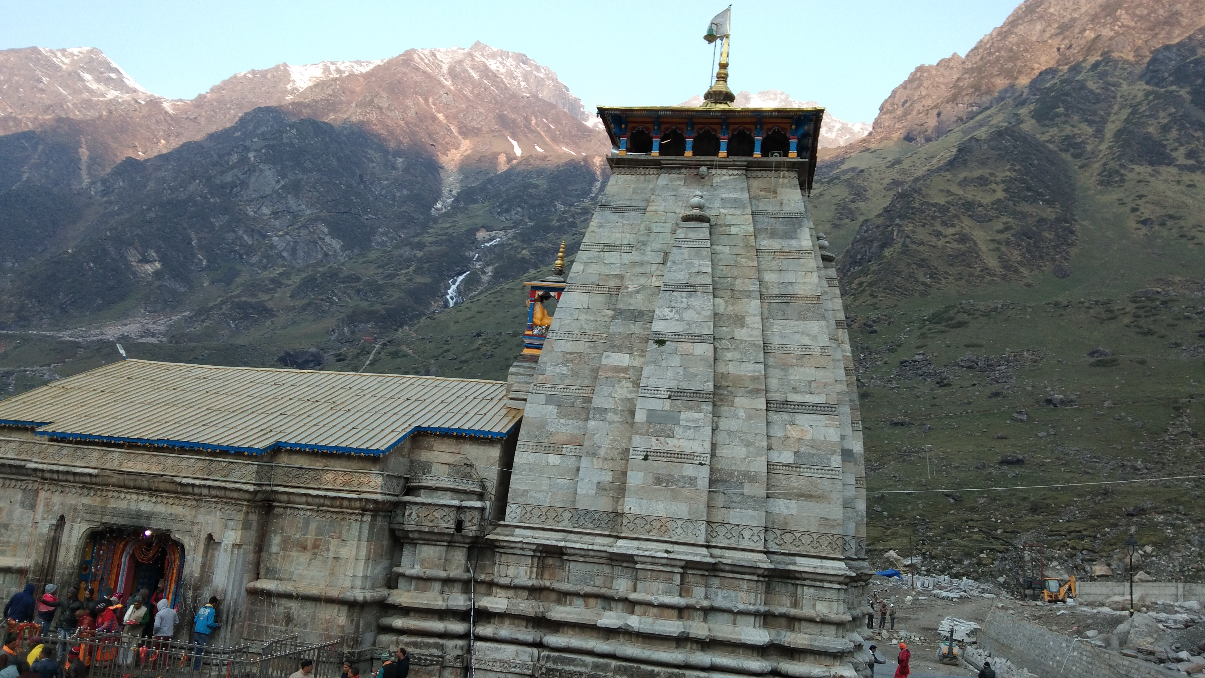 केदारनाथ मंदिर पूर्व द्वार